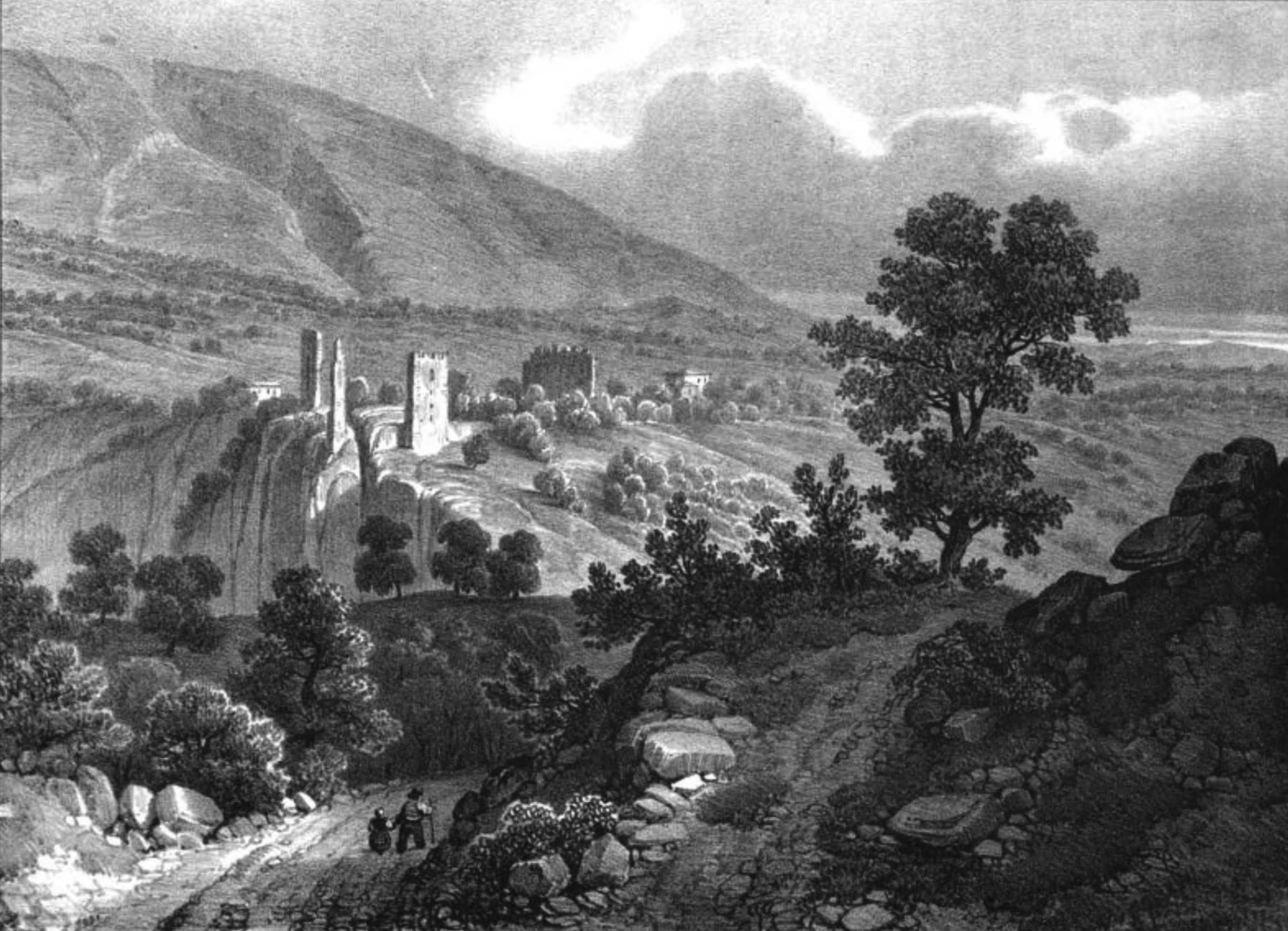 Album du Dauphiné - tome III, lithographie de St Marcellin, route de Beauvoir